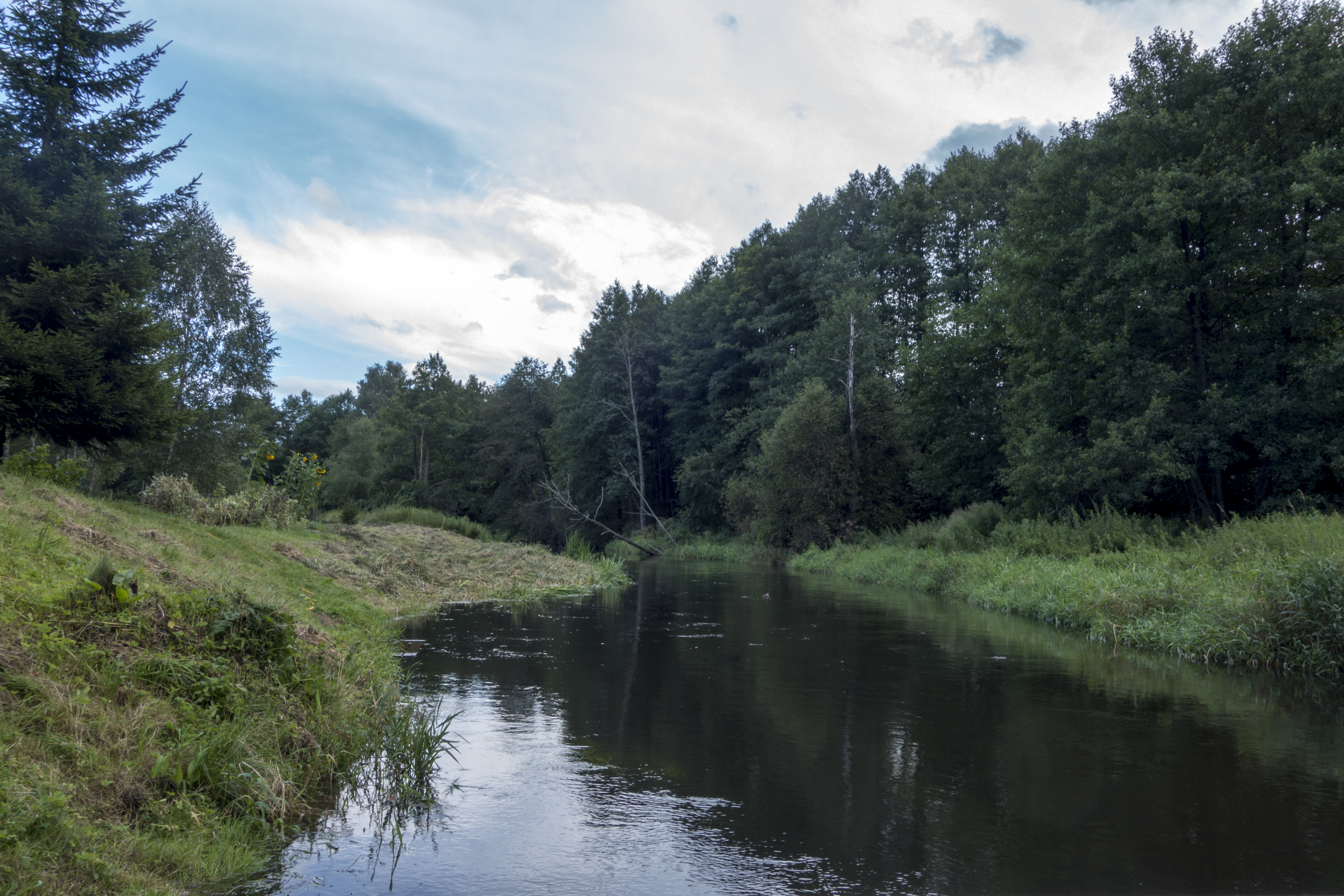 Merkys ties Slizunai